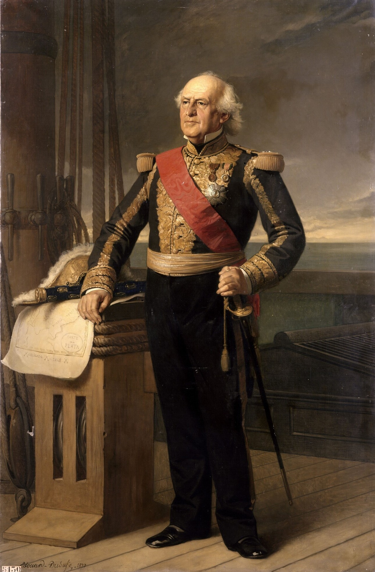 François Thomas Tréhouart, Amiral de France, Sénateur (1798-1873).